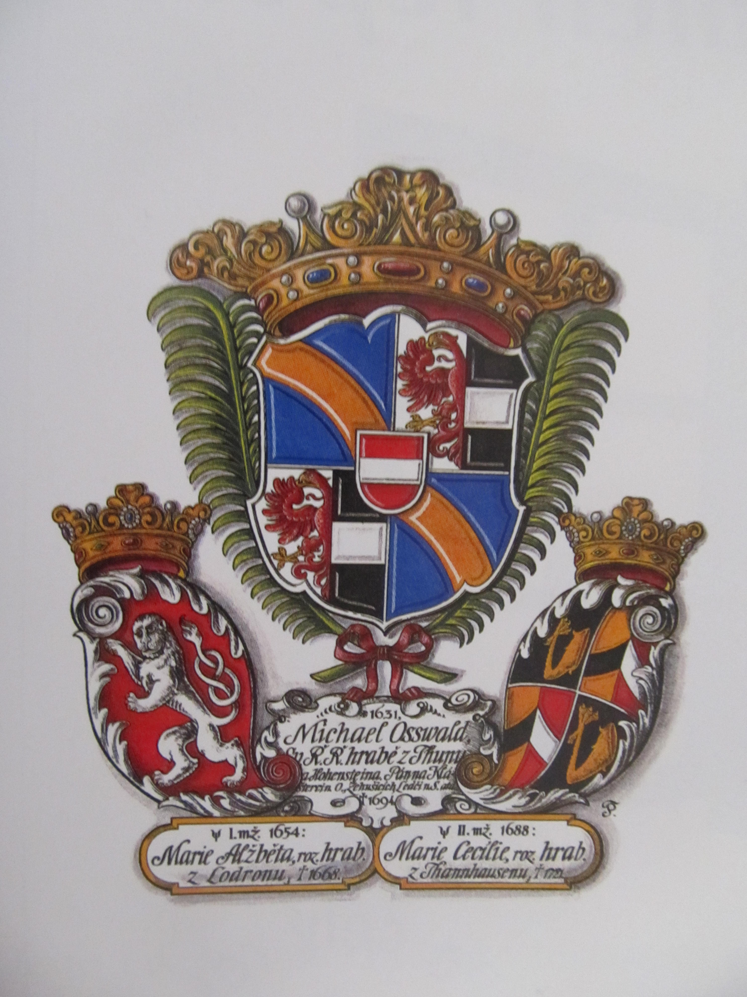 Michael Oswald Thun-Hohenstein